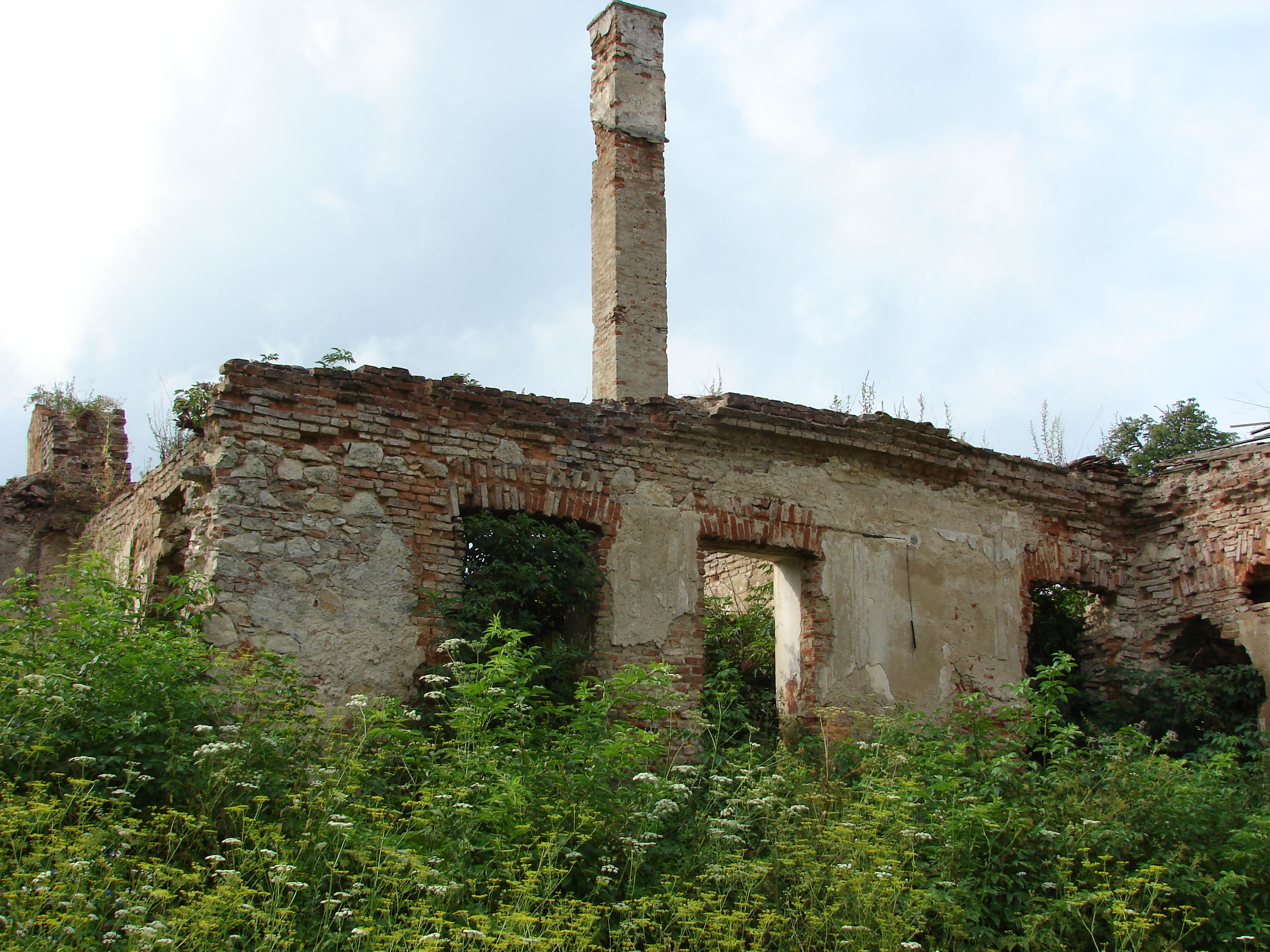 Poza 8